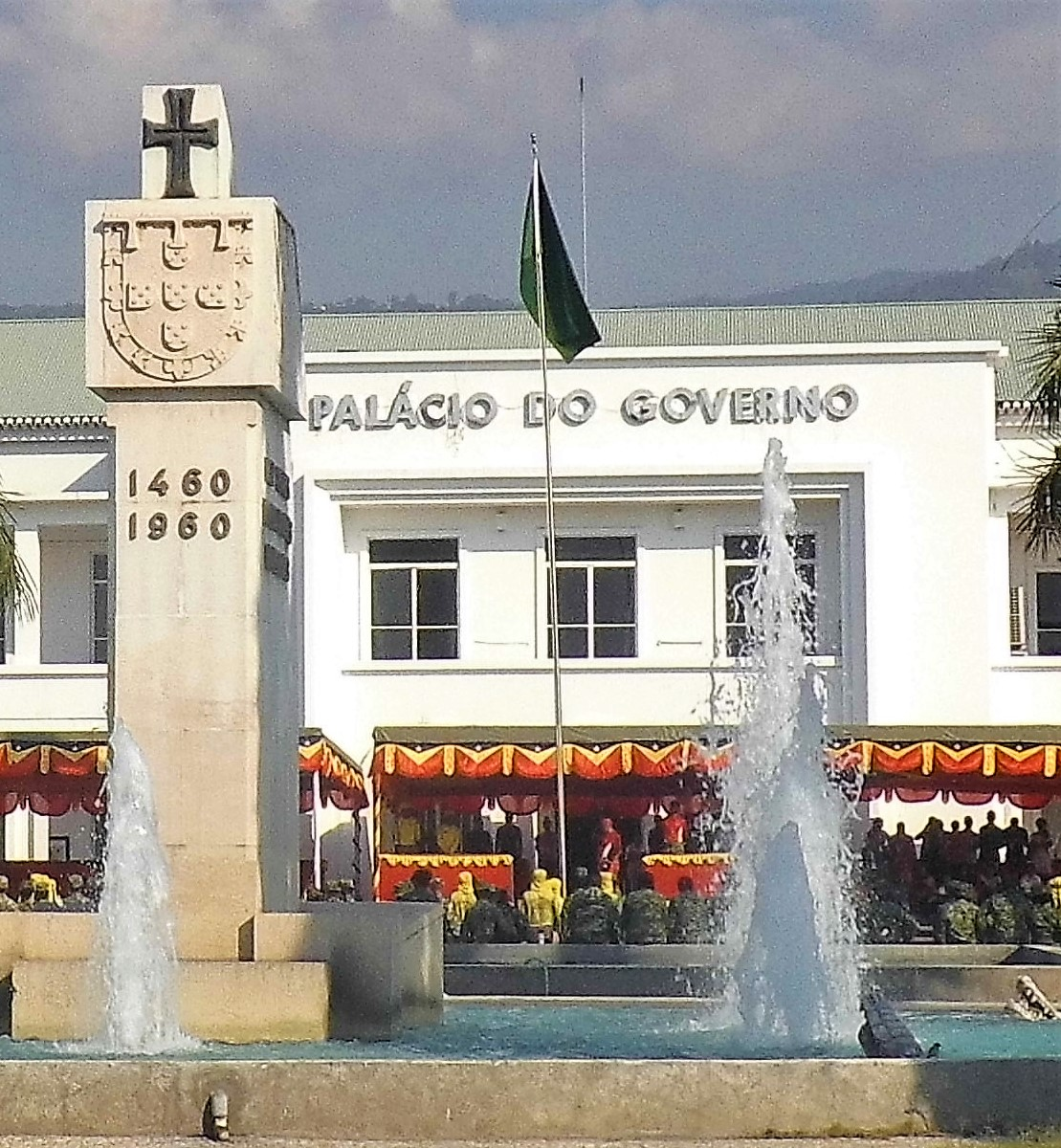 Grüne Flagge am Regierungspalast